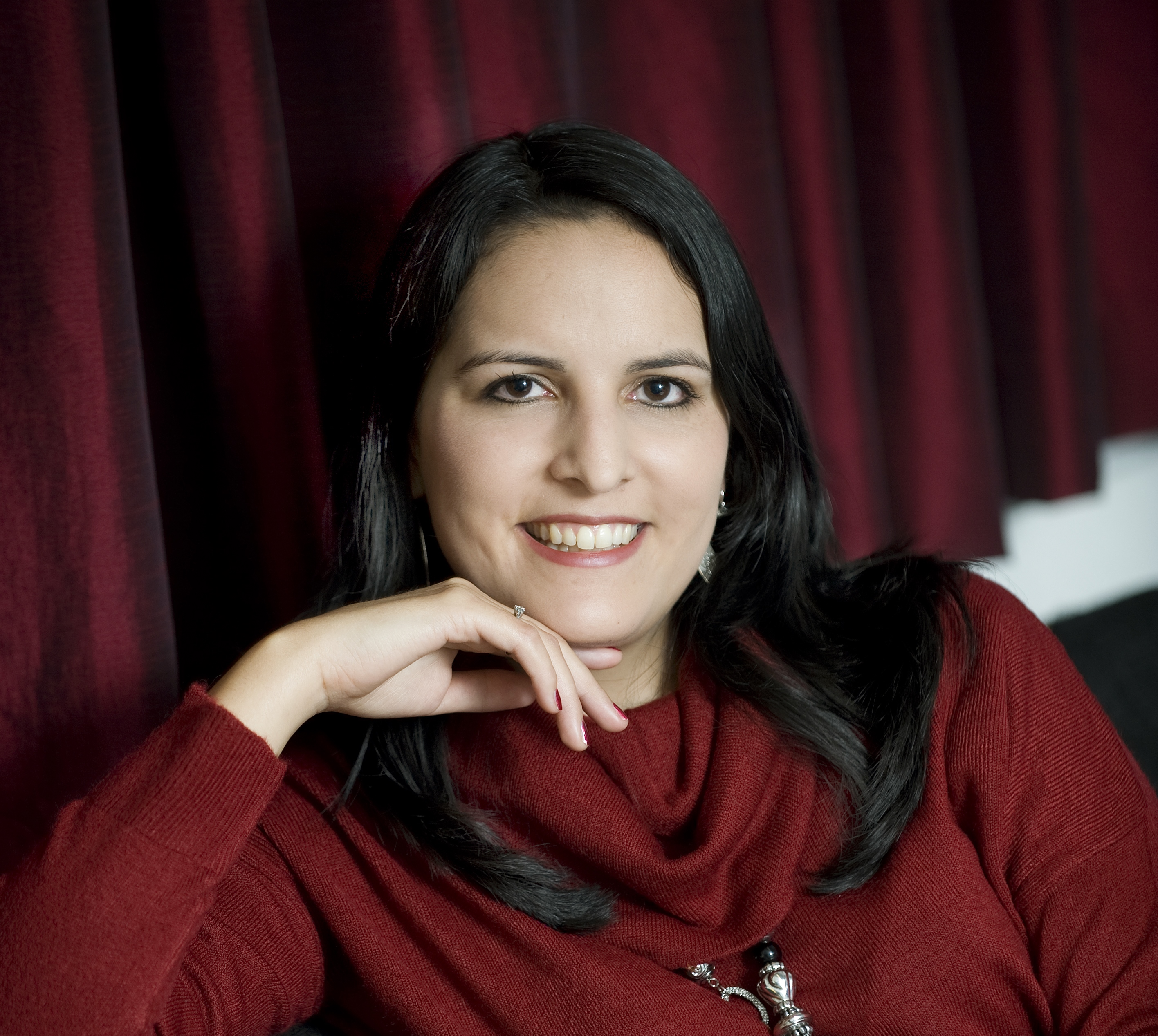 Die Autorin C.M. Spoerri